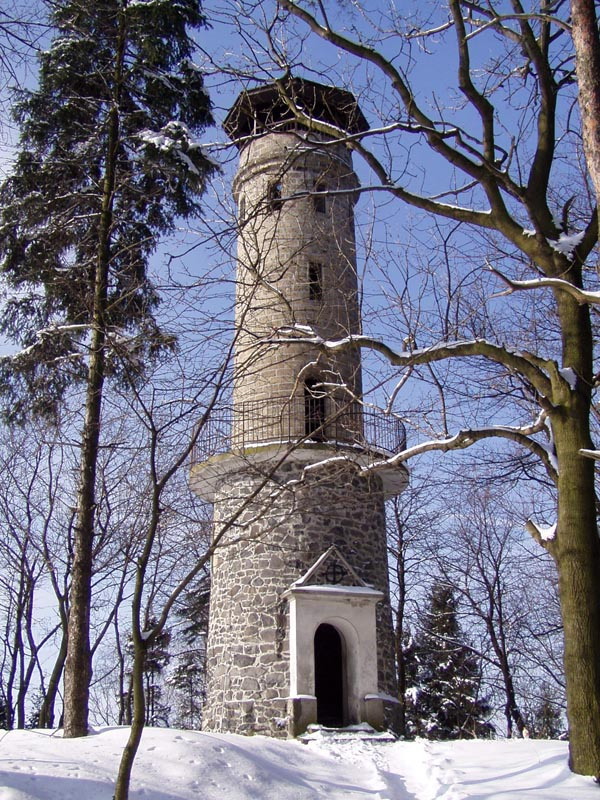 Velký Chlum u Děčína